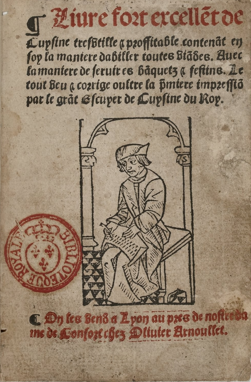 Livre fort excellent de cuisine (Lyon, 1555 edition) title page